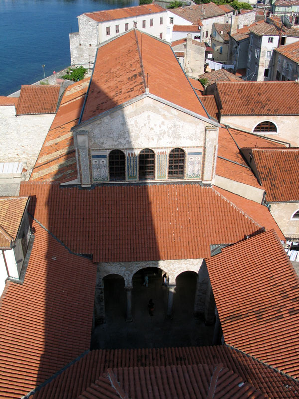 Euphrasius Basilika, Poreč Größe: 600 x 800 Originalgröße: 1944 x 2592 Kamera: Canon Powershot G5